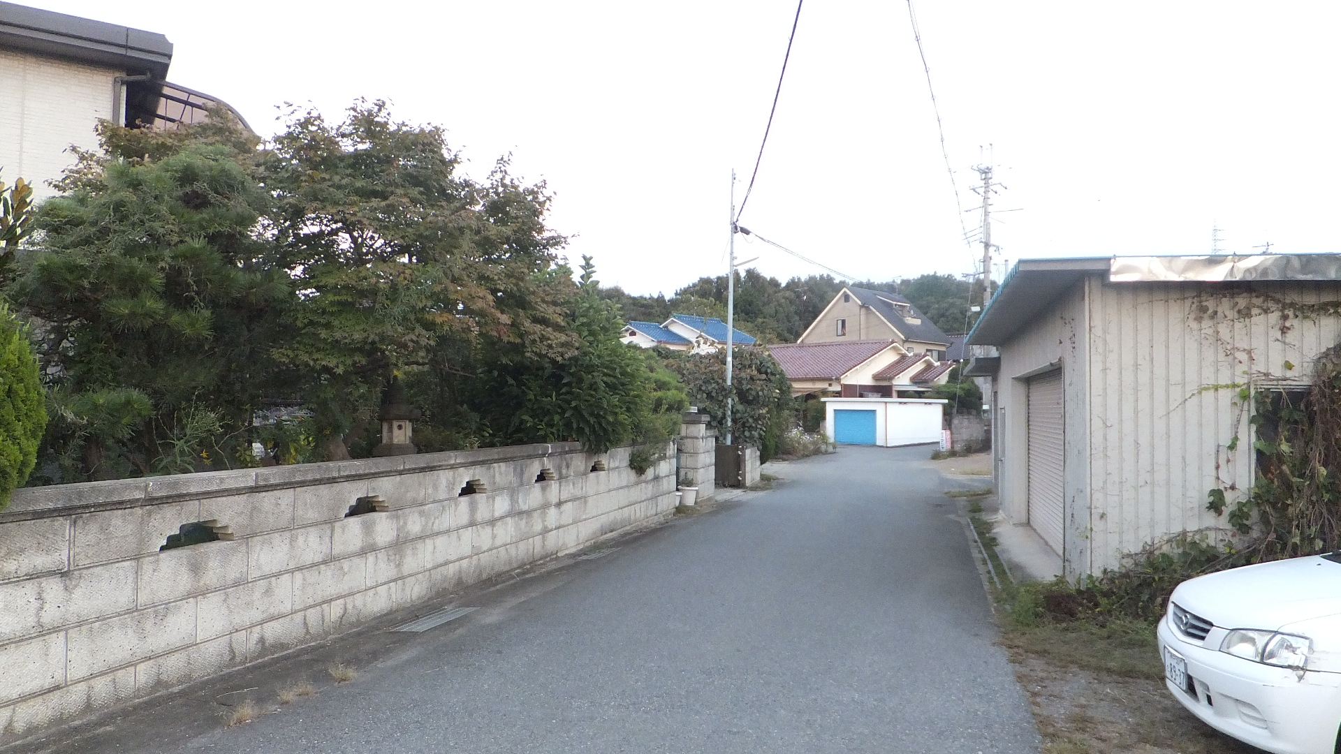 兵庫県三木市別所町東這田